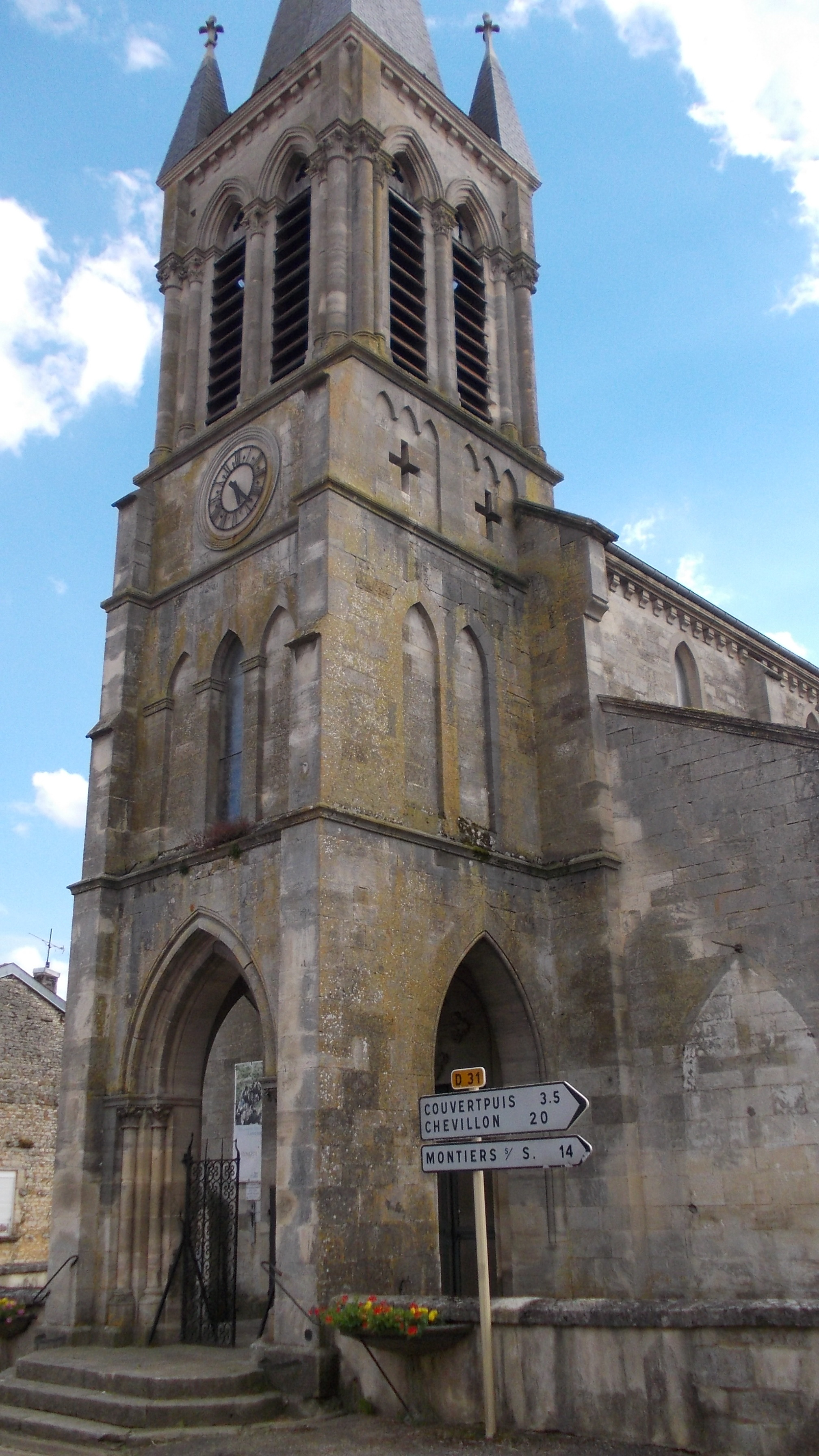 Église de la commune Hévilliers